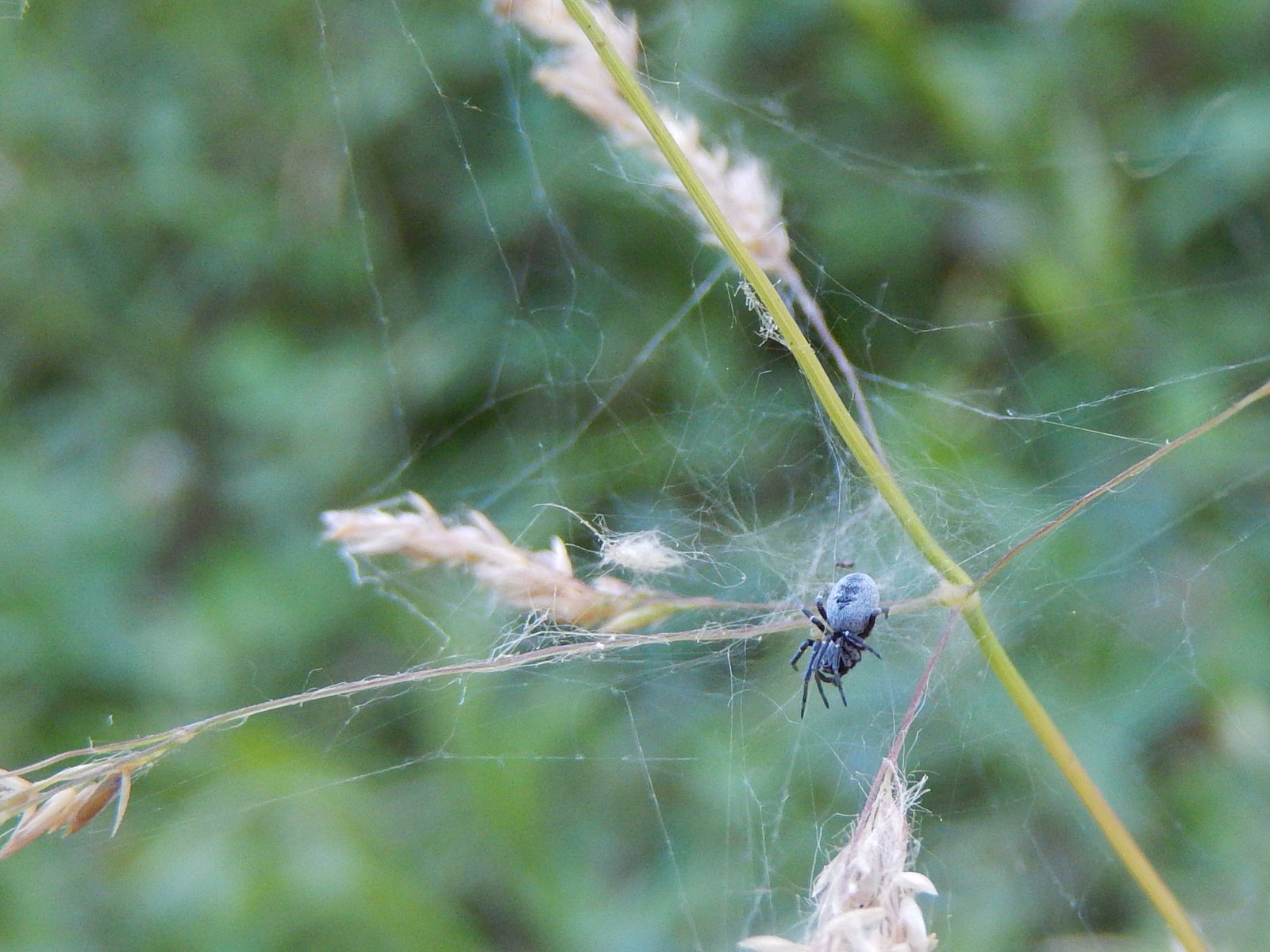 Dictyna latens Fabricius, 1775 - Grazie ad Aracnofilia per la determinazione.